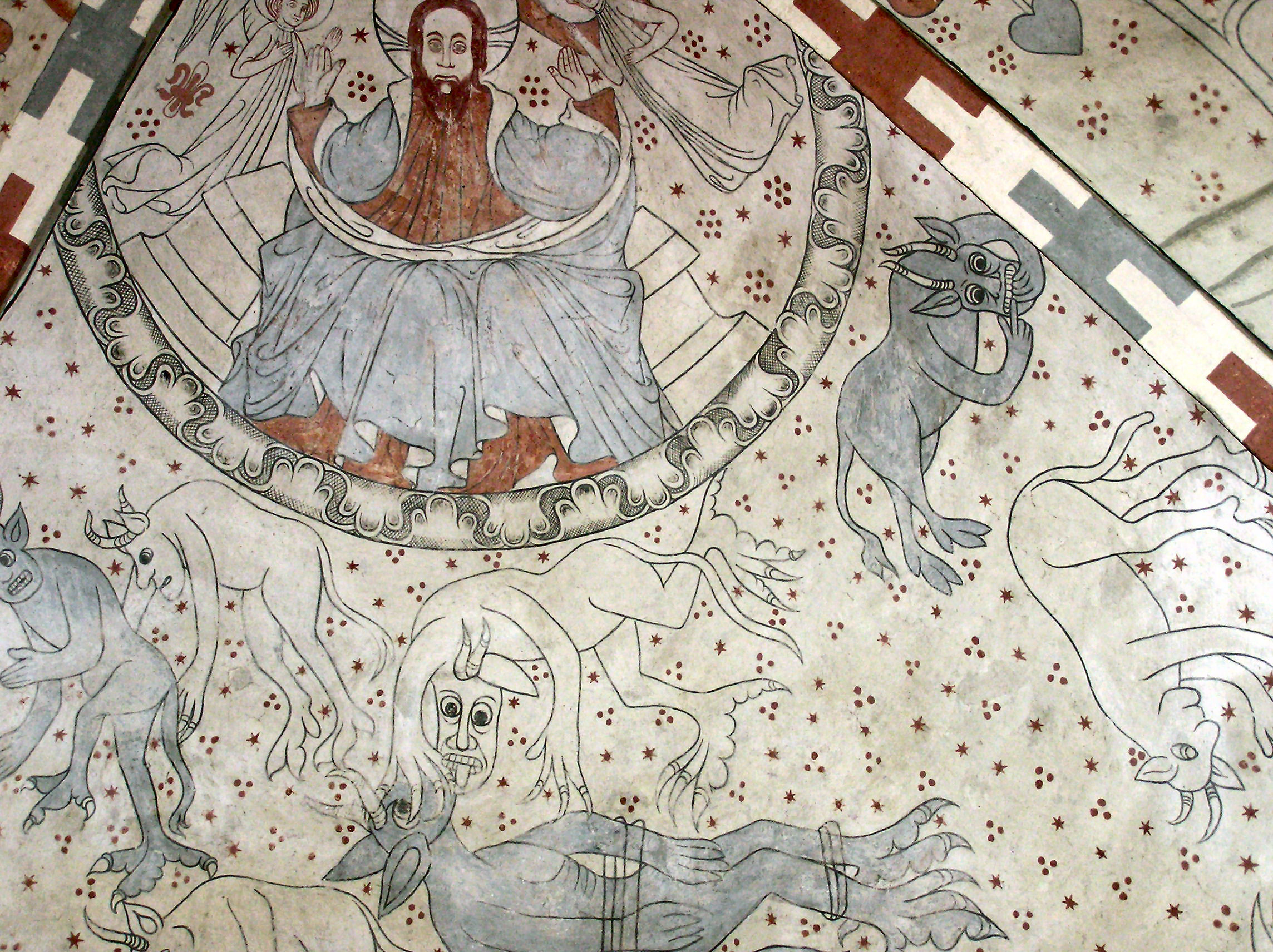 Vittskövle Kirke, Skåne, Skabelsesberetningen:I begyndelsen skabete Gud himlen og jorden. Jorden var dengang tomhed og øde (1. Mos. 1,1-2)